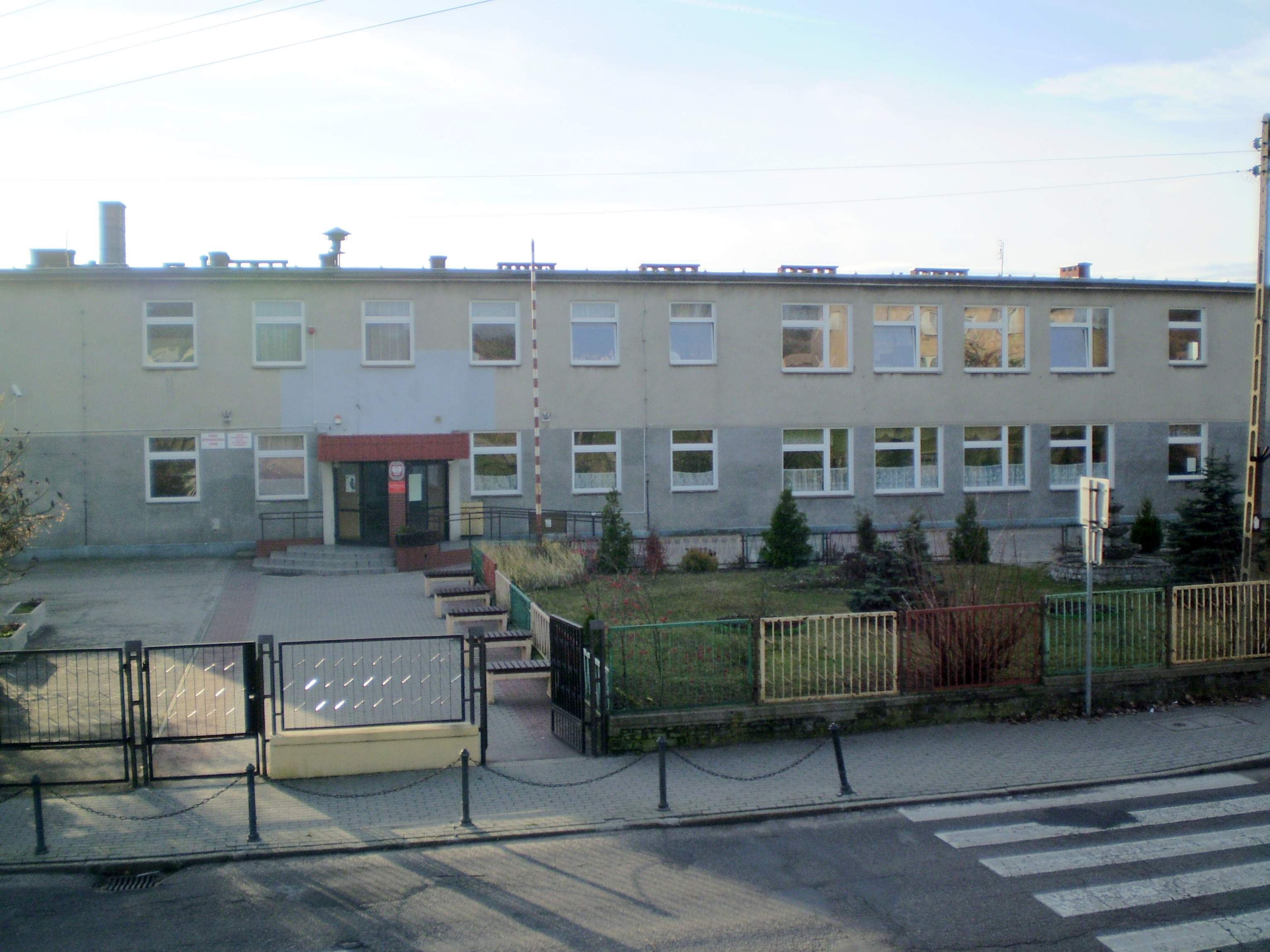 Gubin, ul. Kresowa 48 - Szkoła Podstawowa nr 3